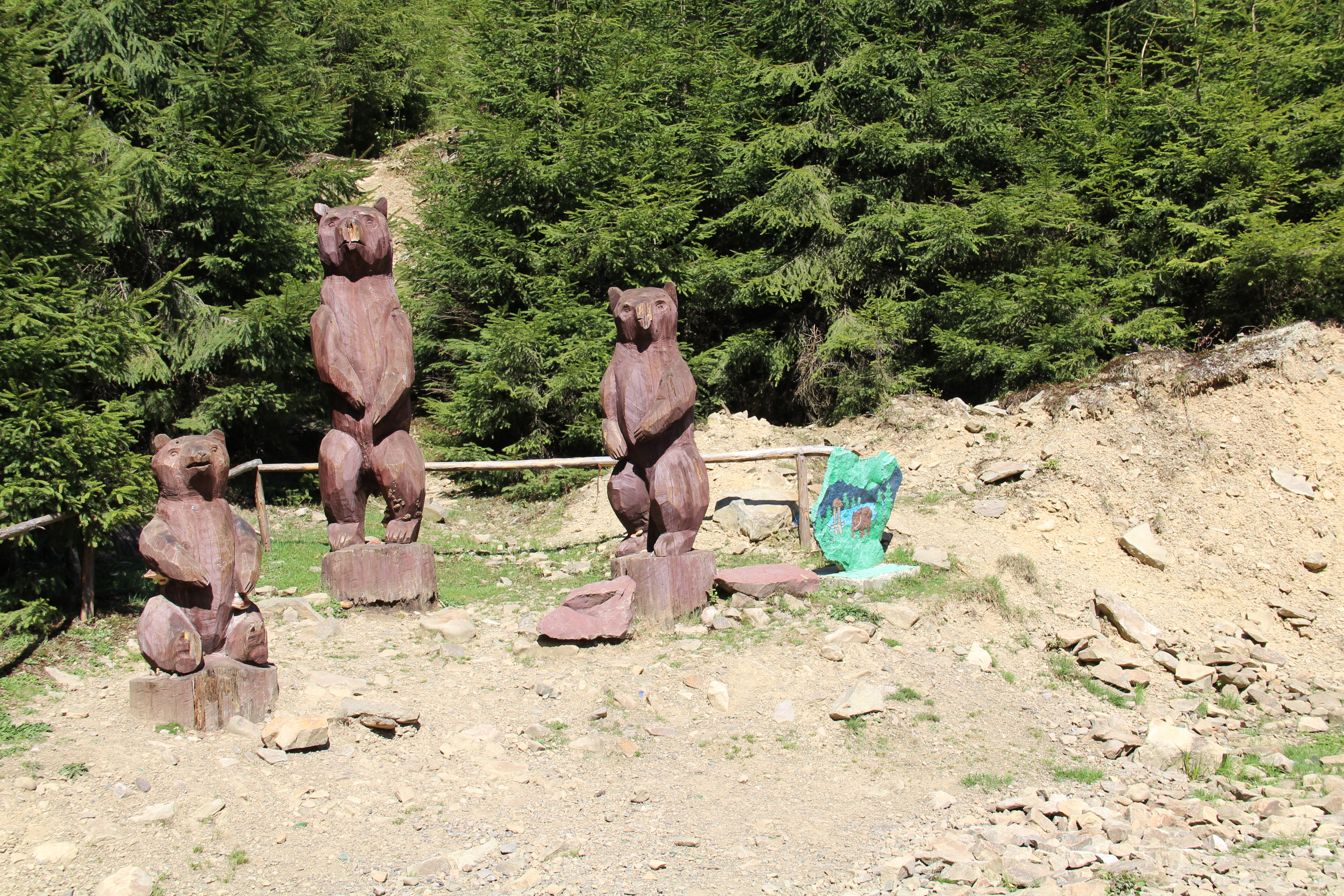 Скульптури при в'їзді до реабілітаційного центру бурих ведмедів Національного природного парку Синевир